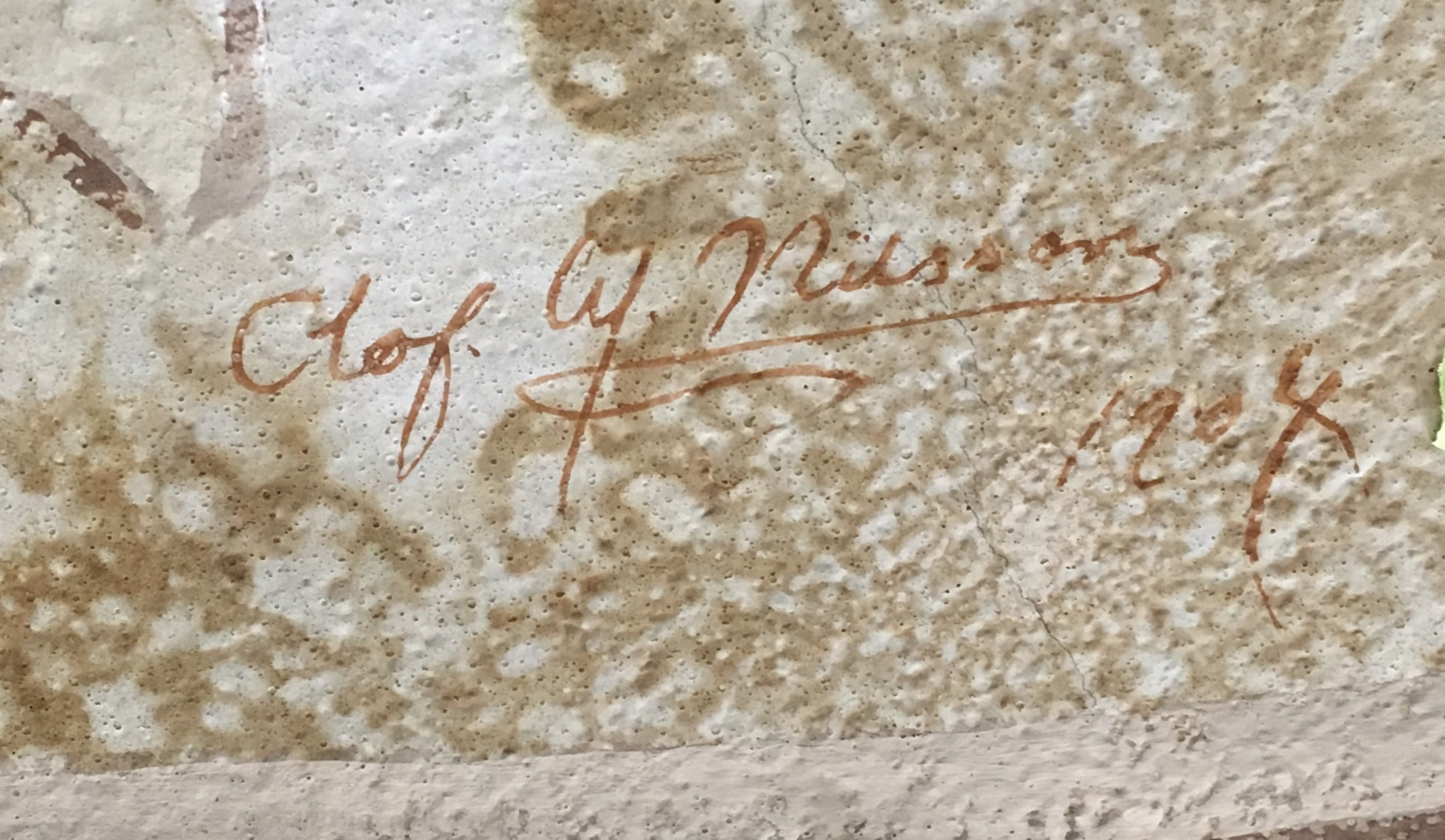 Olof W. Nilssons signatur i från takmålningen på Grand Hotell i Karlstad.